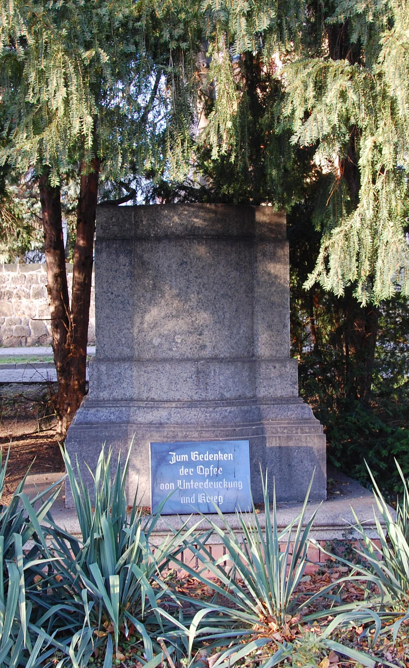 Denkmalsockel in Quedlinburg